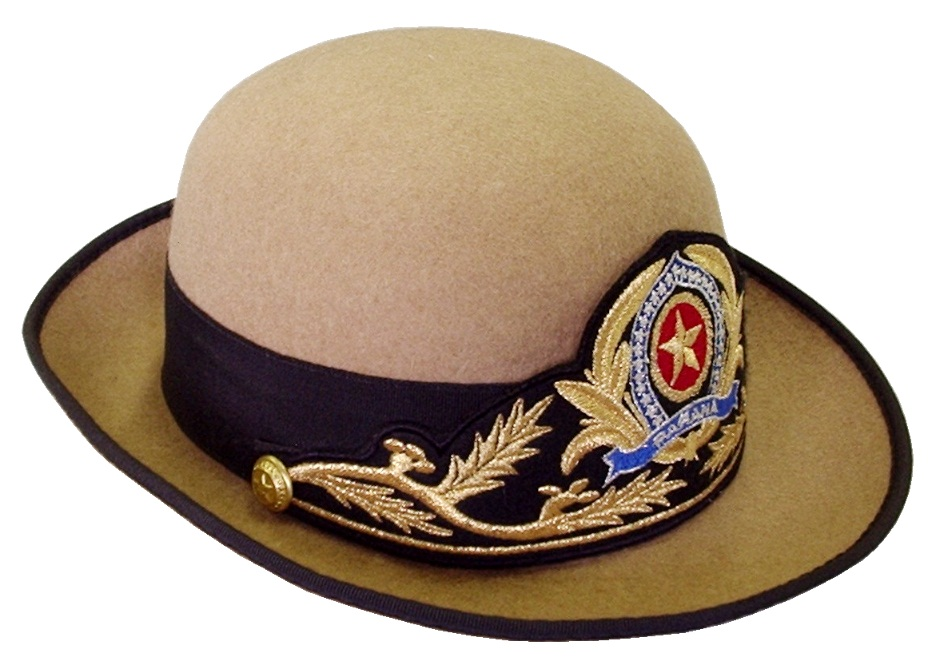 Chapéu de feltro feminino da Polícia Militar do Paraná em 2001.